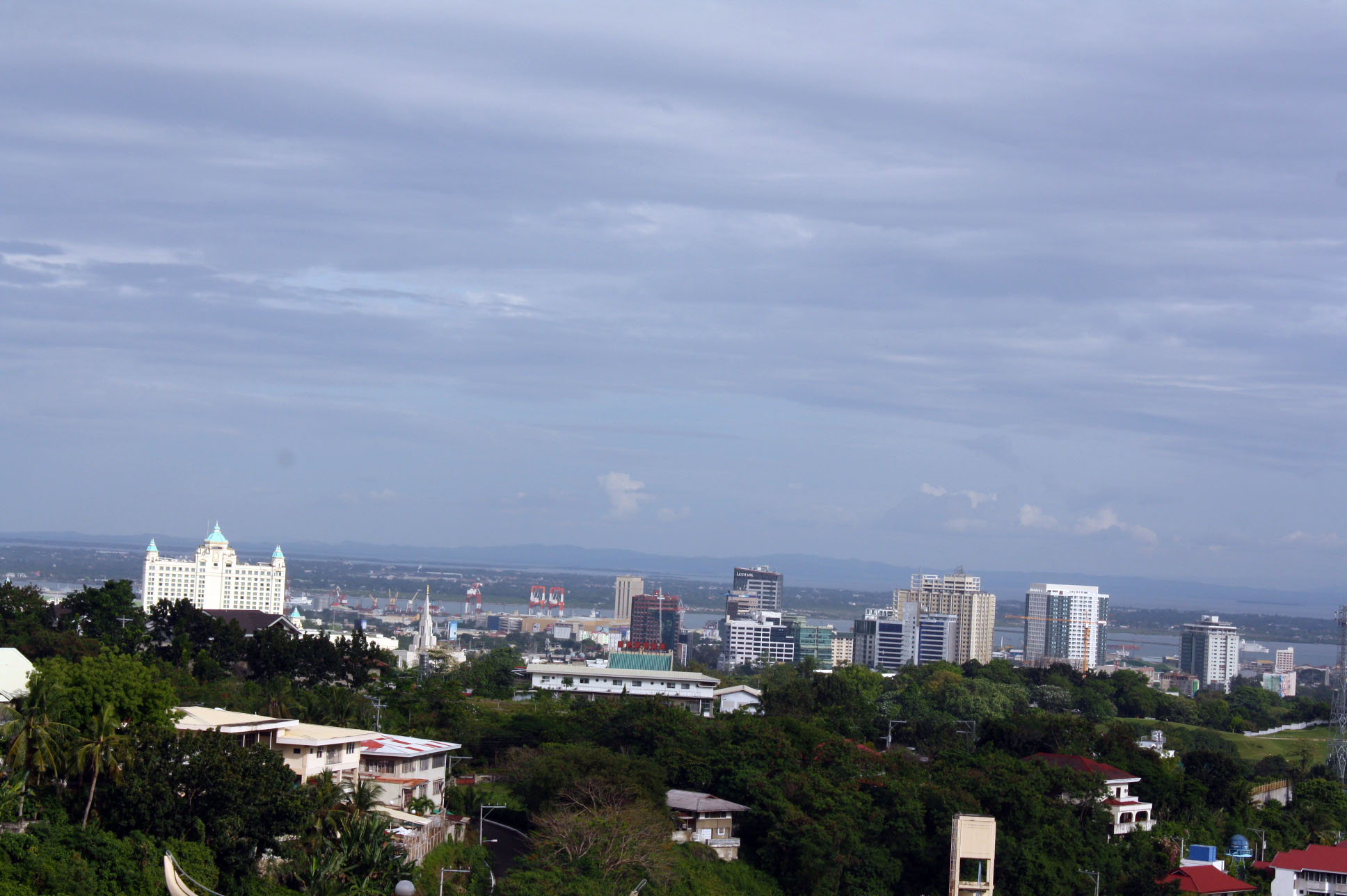 March 26, 2012